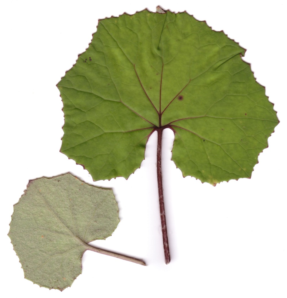 Blätter des Huflattichs (Tussilago farfara) - großes Blatt: Oberseite, kleines Blatt: Unterseite